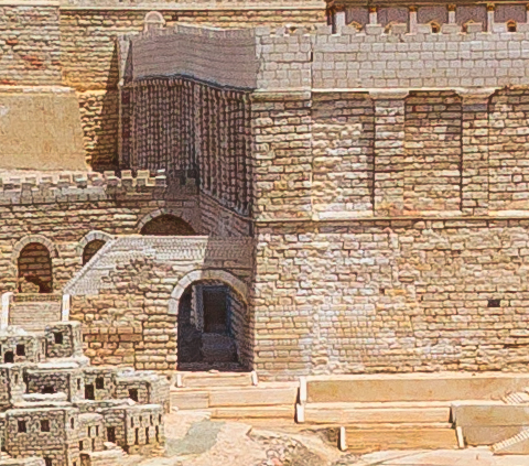 Detail Robinson's Arch, Südwestlicher Aufgang zum Tempel (Holyland-Modell, 2014)